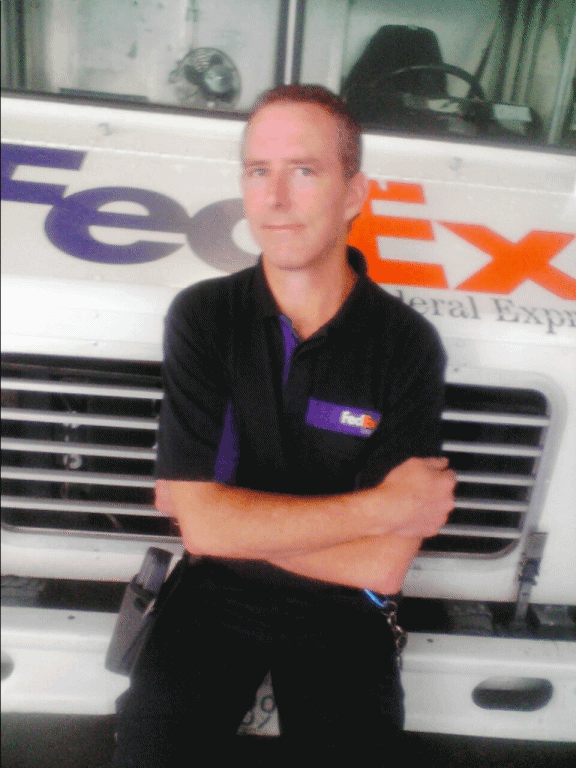 imagen de mi propio fruto de un hombre de FedEx al lado se su vehiculo, libro todos los derechos para que cualquiero lo use pare cuailquier proposito